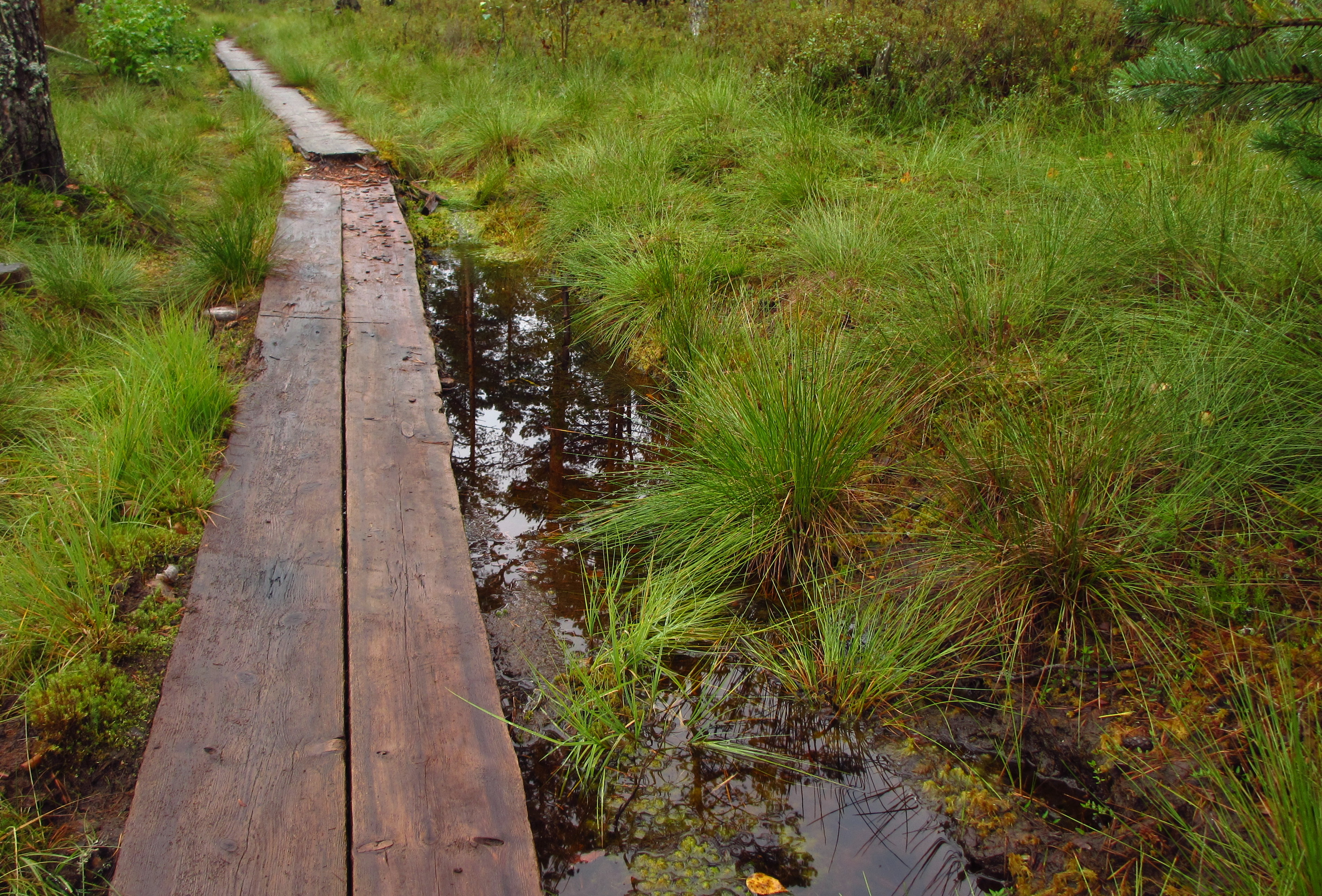 Laudtee Tudusoo LKA